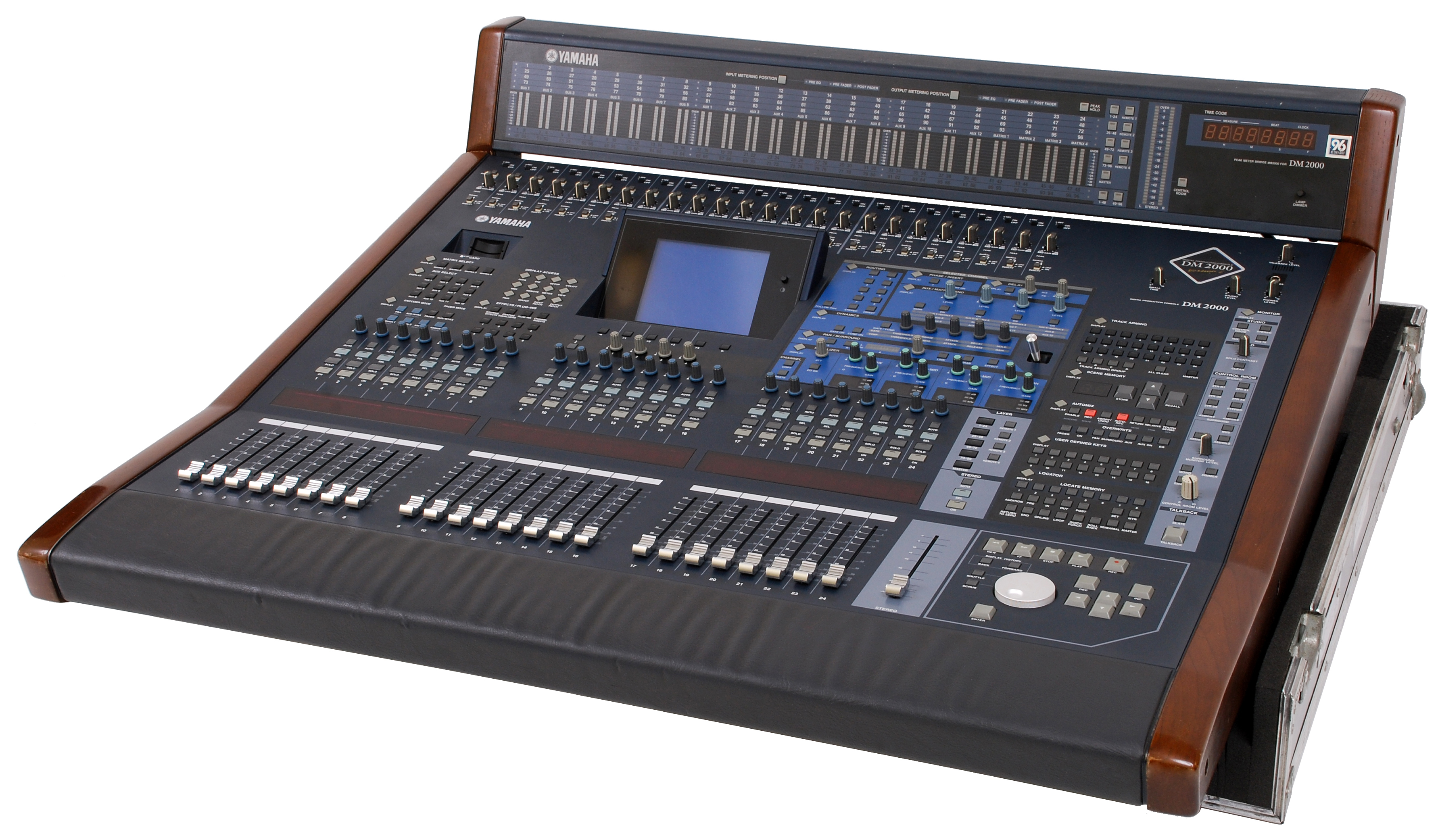 Mikser cyfrowy DM2000V2k firmy Yamaha